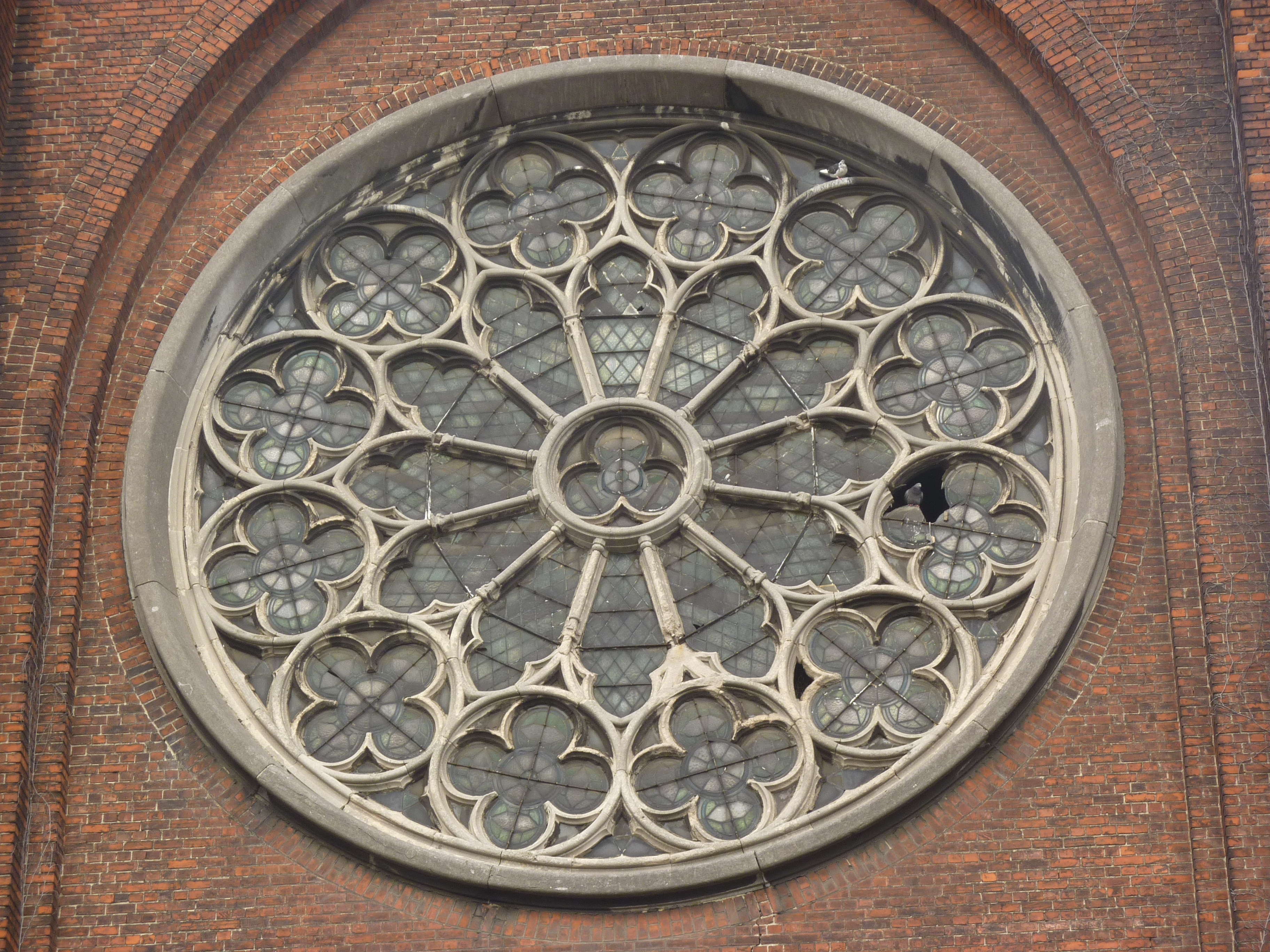 Église Saint-François-d'Assise à Schaerbeek), Bruxelles, Belgique.